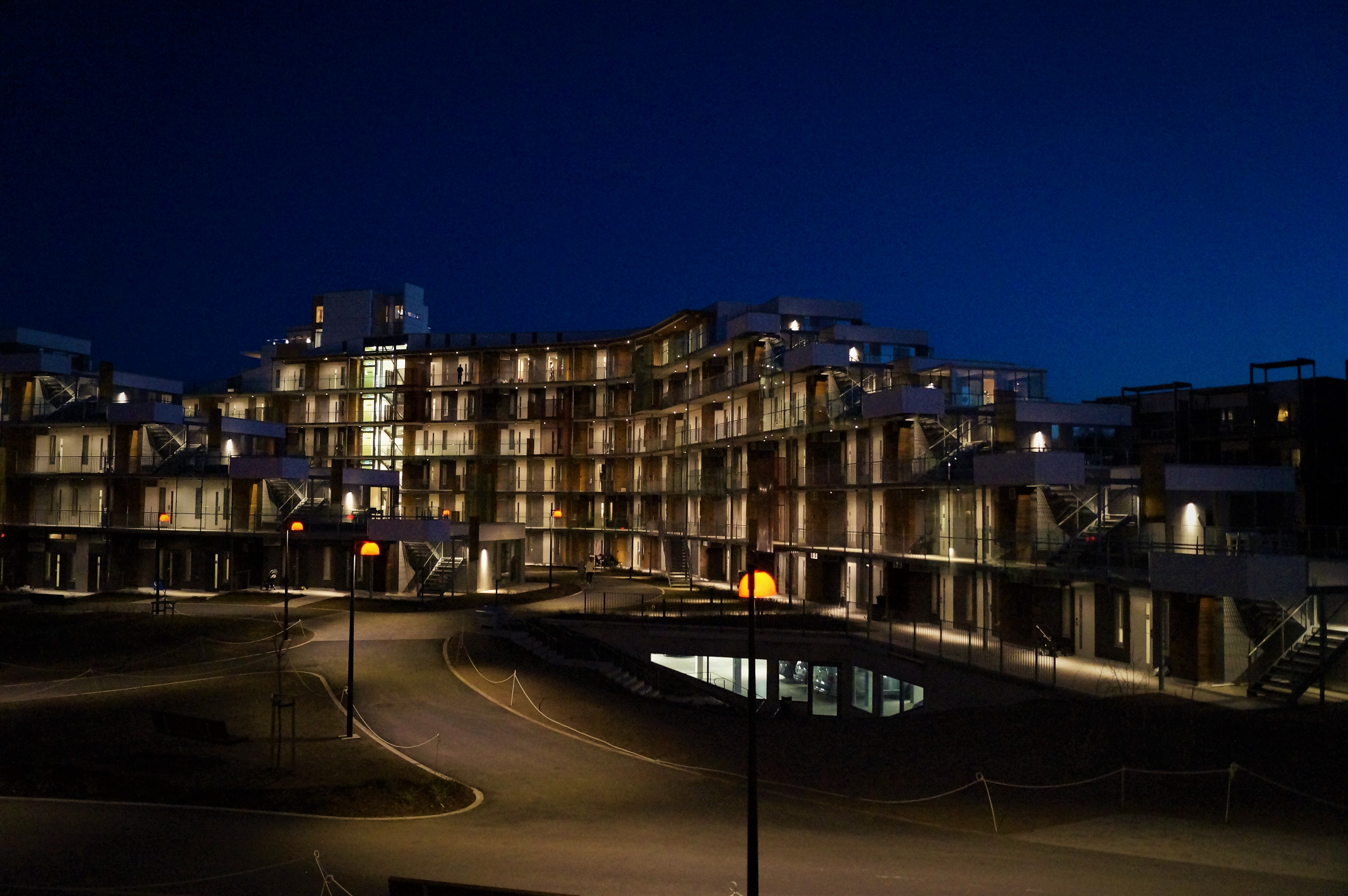 De nye hotellbyggene på Oslofjord Convention Center